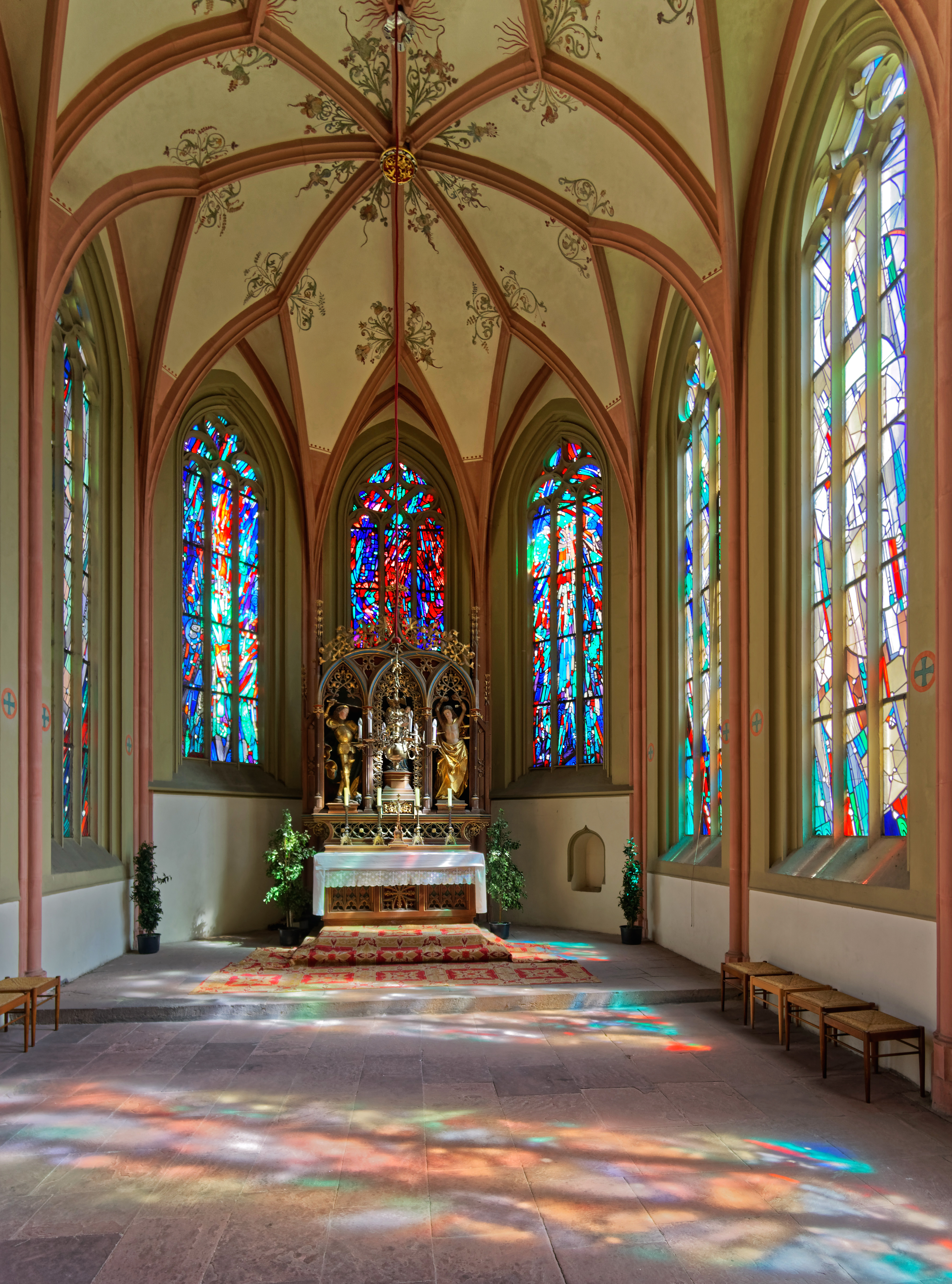 Interior of the chapel St. Michael in Ochsenfurt.